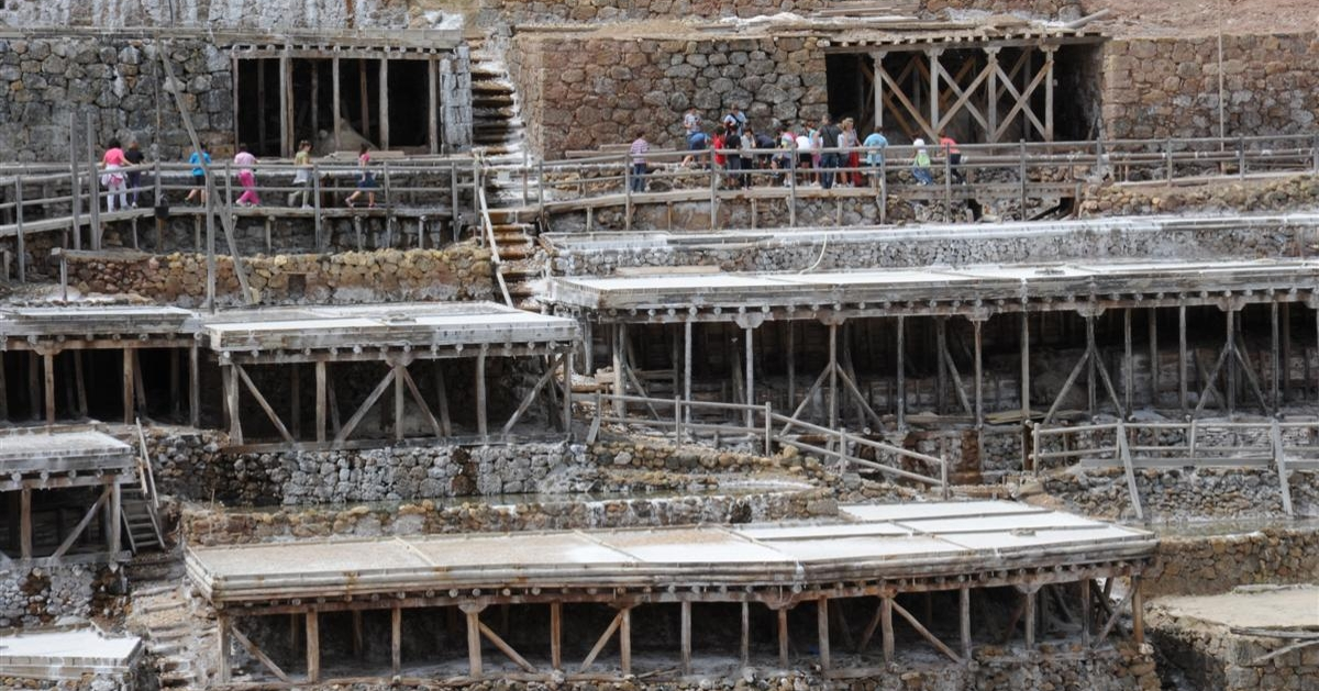 Visitas guiadas por el Valle Salado de Salinas de Añana, País Vasco, España